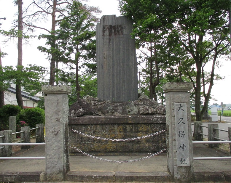 郡山市安積町牛庭にある大久保神社